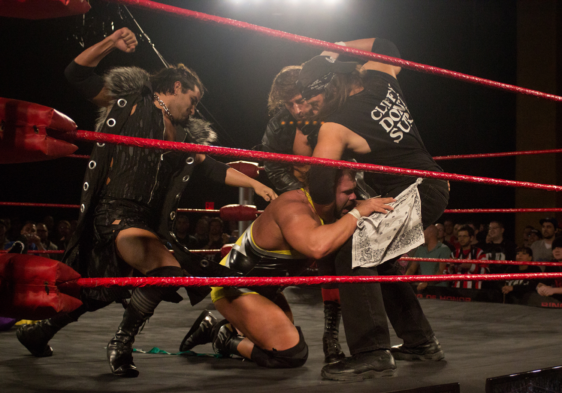 SCUM stable